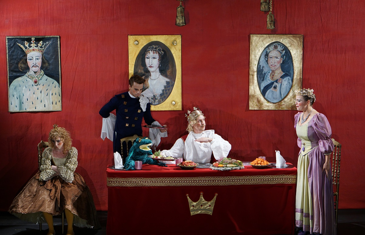 Der Froschkönig - nach den Gebrüdern Grimm Theaterstück im Münchner Theater für Kinder in der Spielzeit 2018/2019